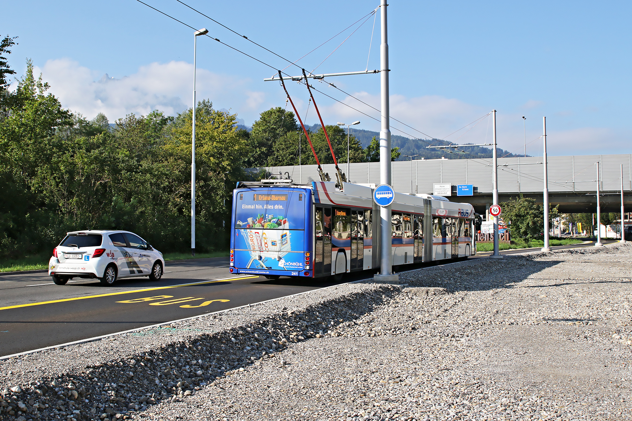 Der Hess/Vossloh-Kiepe BGGT-N2D "LighTram 4" Nr. 241 der Verkehrsbetriebe Luzern befährt die im Sommer 2018 eröffnete Busspur zwischen den Haltestellen Grosshofstrasse und Kupferhammer in Kriens.